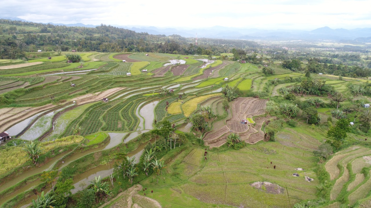 Sawah di Pariangan